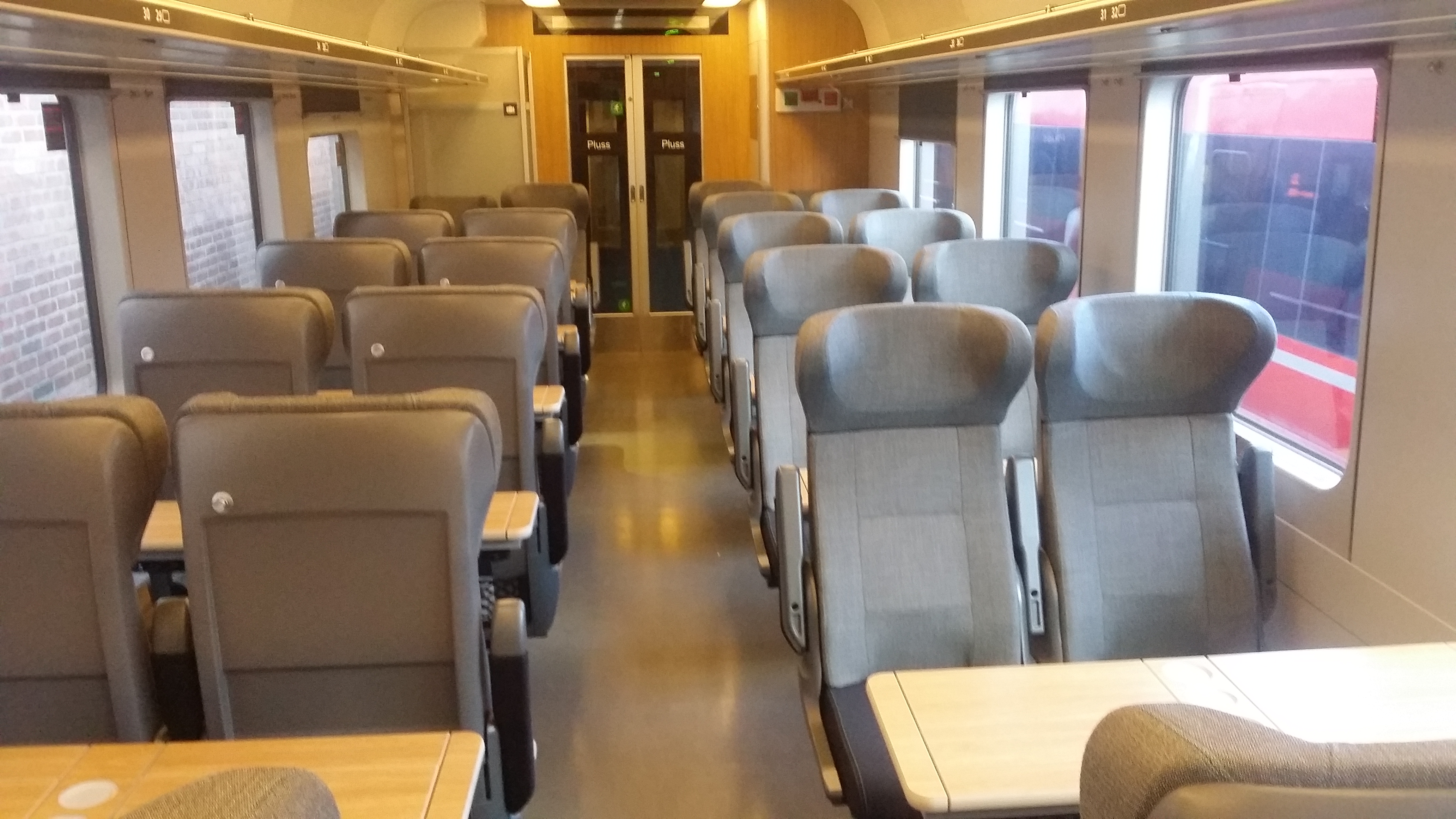 A5 26013 oppusset og gitt ny innredning som Vy Pluss.